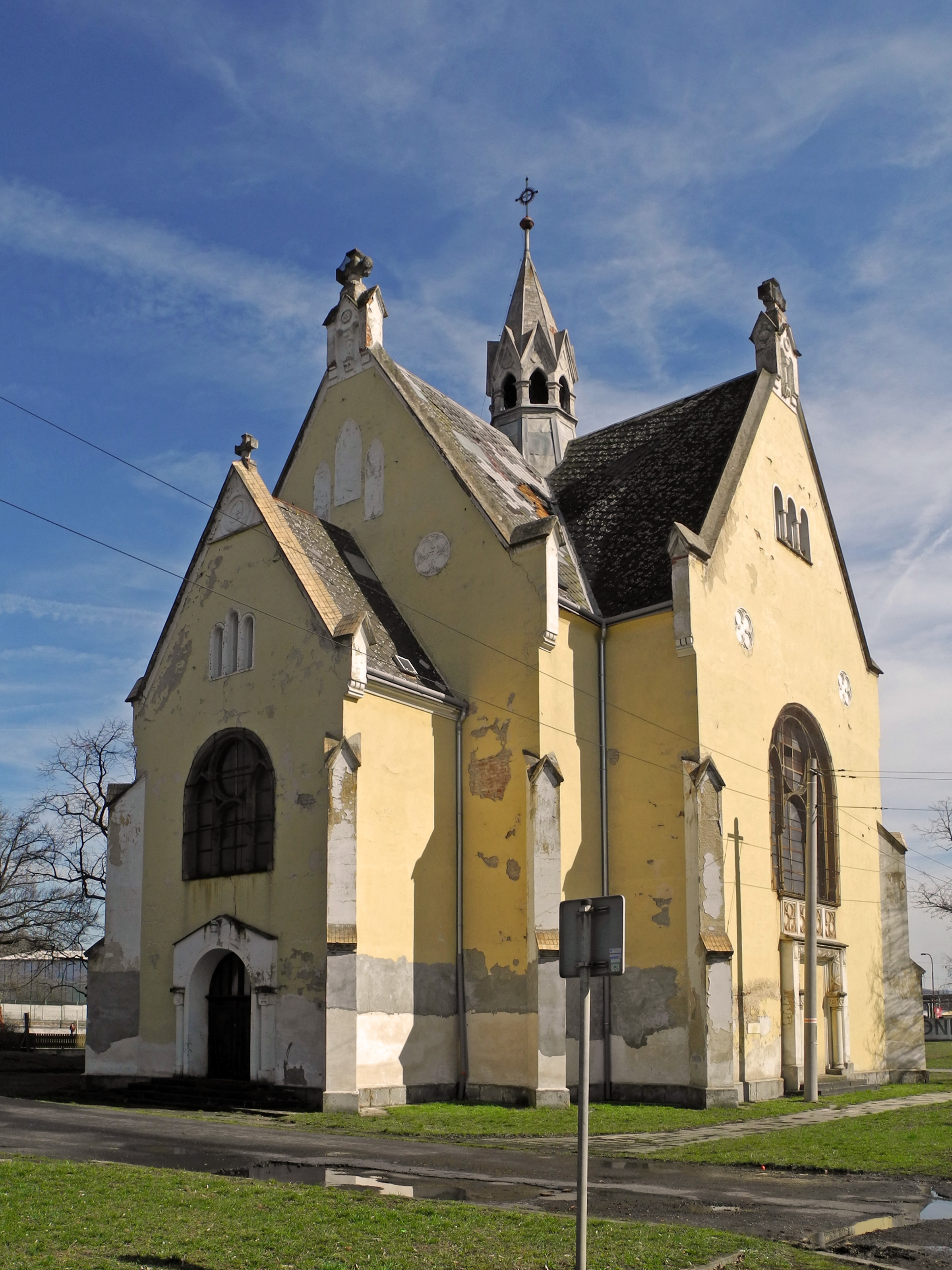 Kirche St. Josef in Aussig-Prödlitz – Ústí nad Labem-Předlice, Školní náměstí